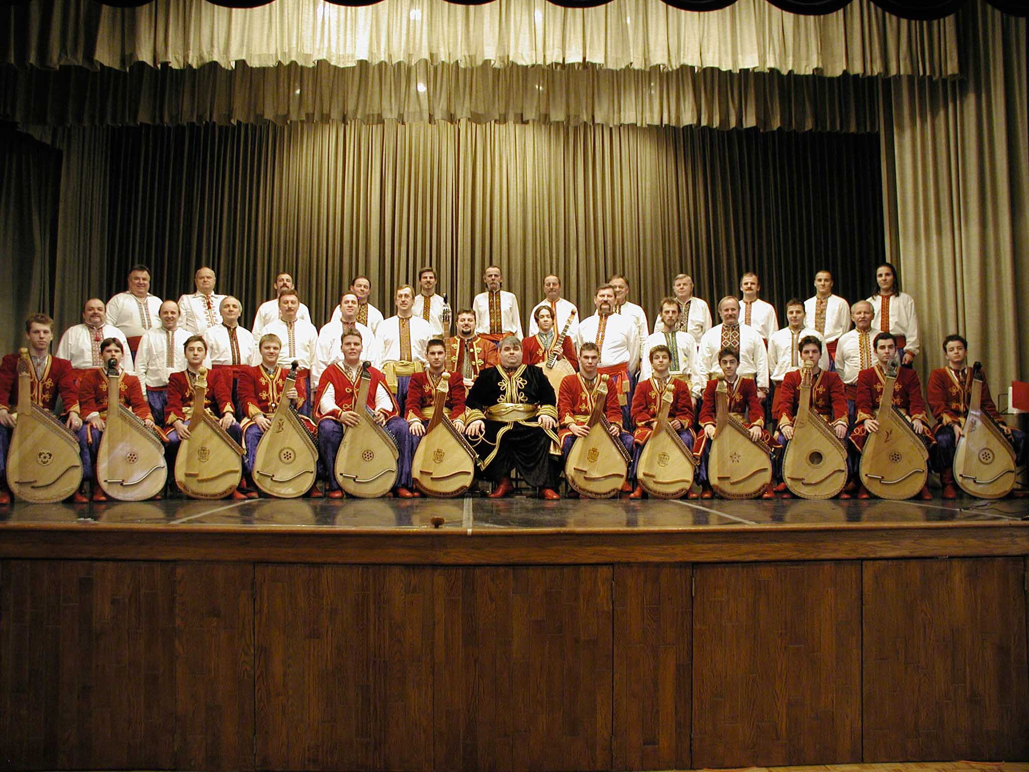 Canadian Bandurist Capella 2003